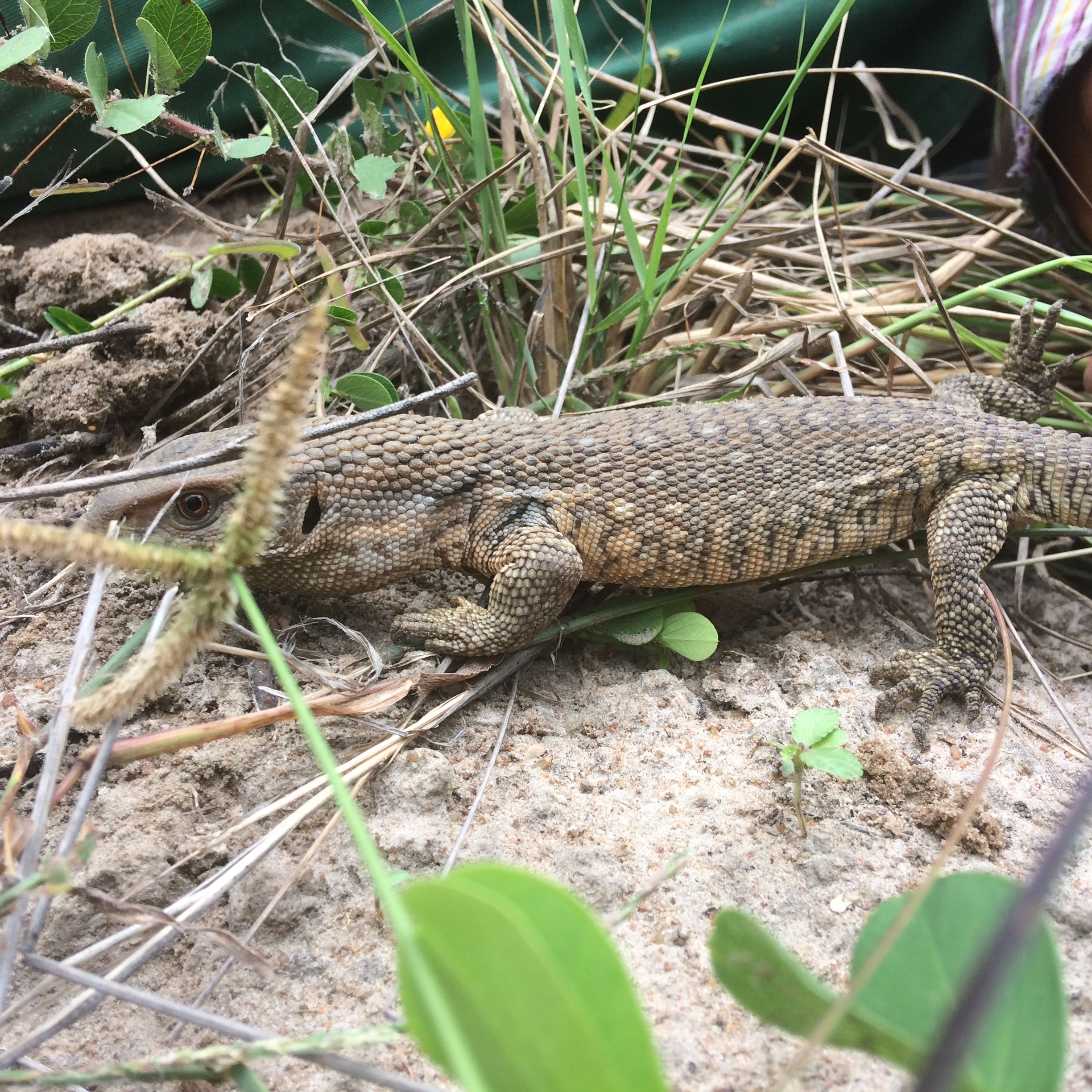 Ung vild stäppvaran som precis blivit vägd och måttad.